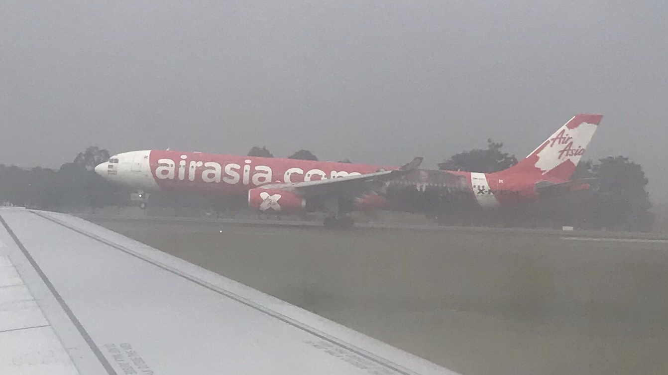 imej ini merupakan imej hasil karya saya sendiri